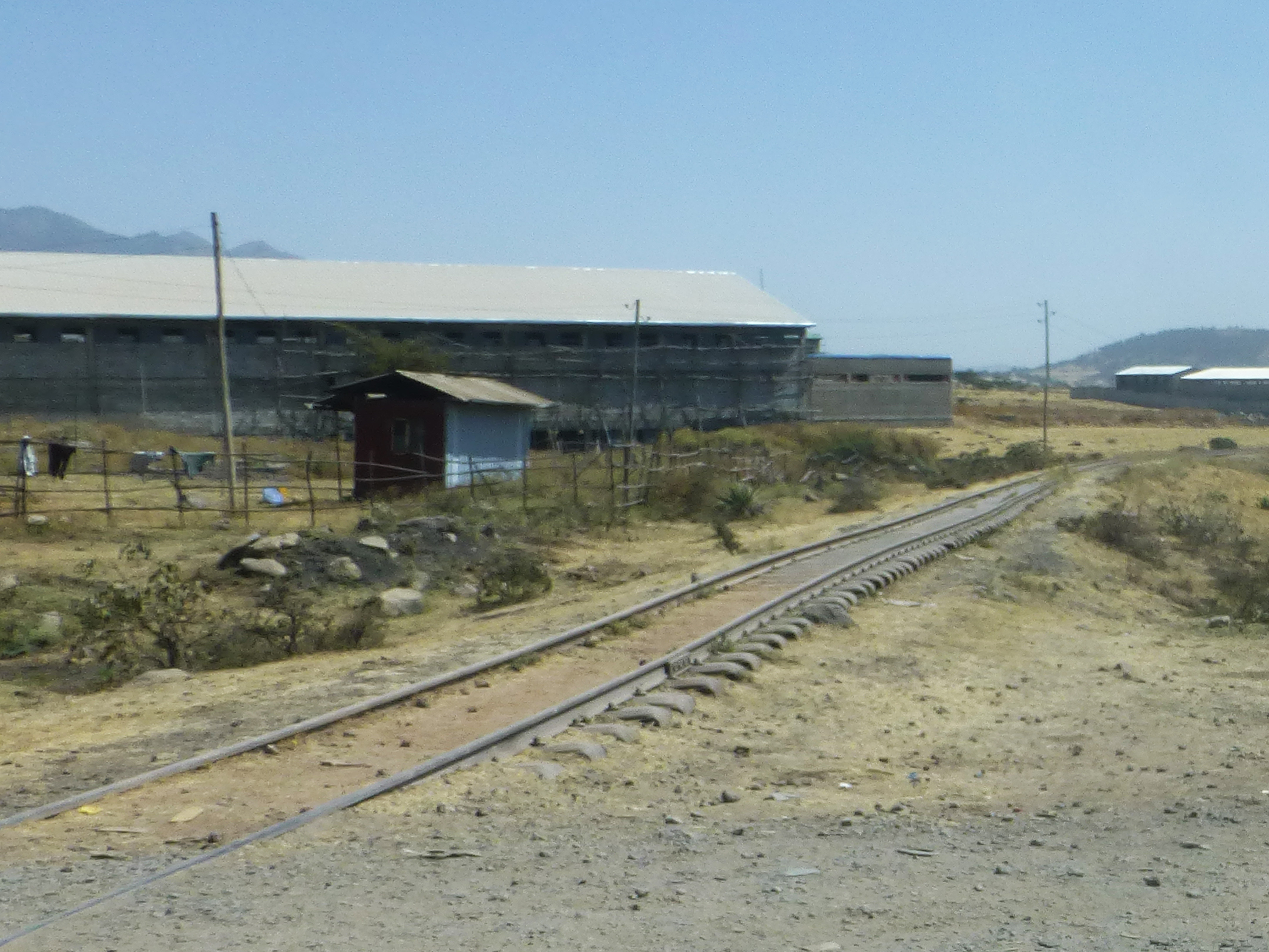 Ancienne ligne de chemin de fer Djibouti-Addis Abeba (entre Adama et Addis)